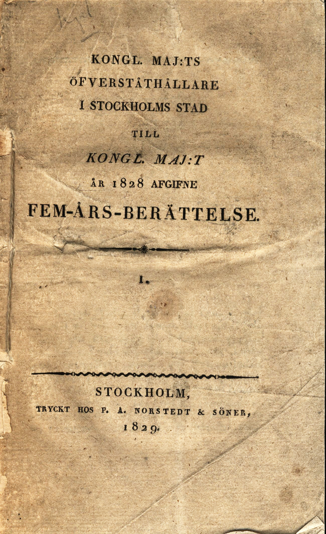 Kongl. maj:ts öfverståthållare i Stockholms stad till kongl. maj:t år 1828 afgifne fem-års-berättelse. Title page.